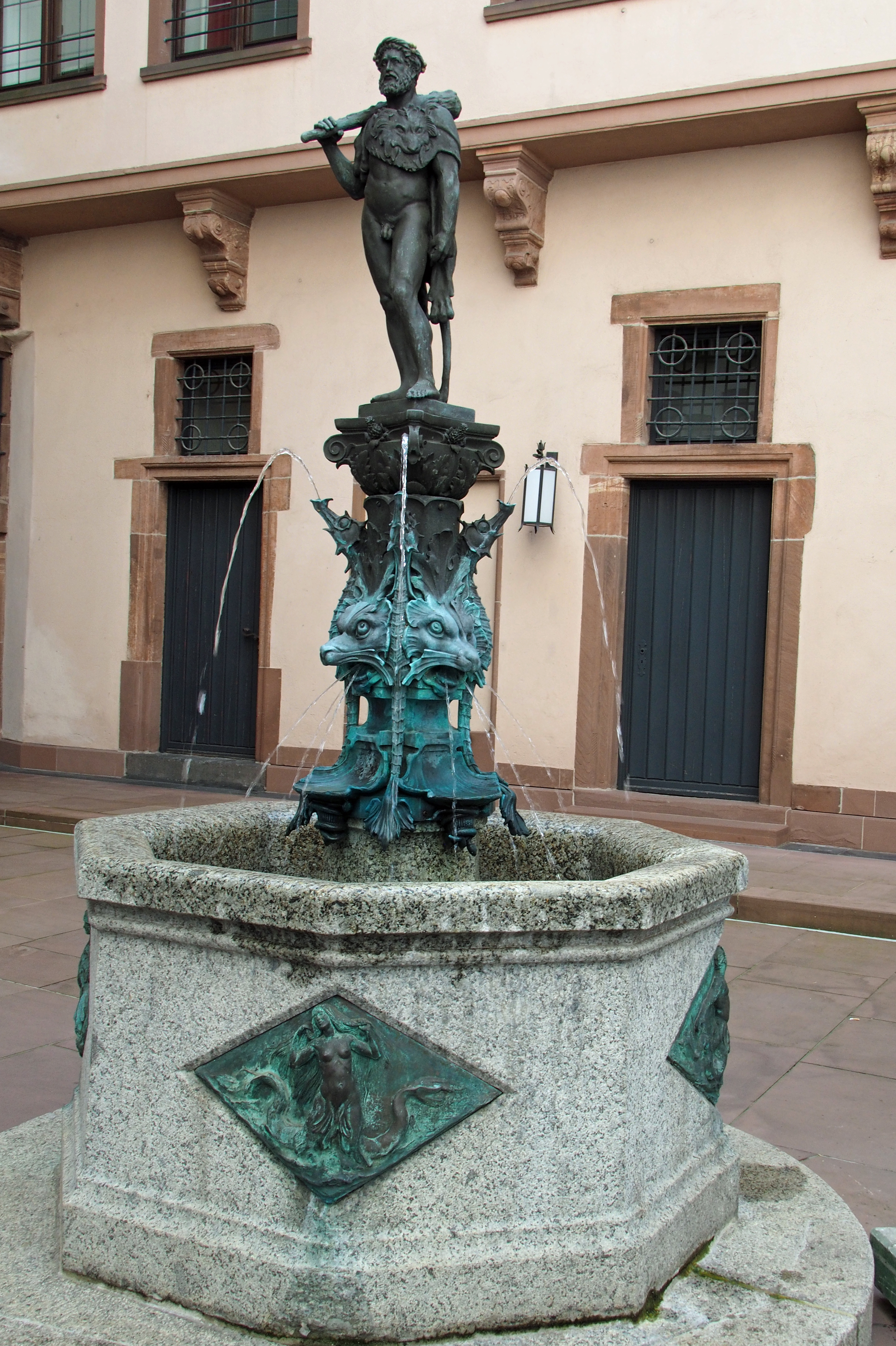 Herkulesbrunnen im Innenhof des „Hauses zum Römer“ (Rathaus), Frankfurt am Main